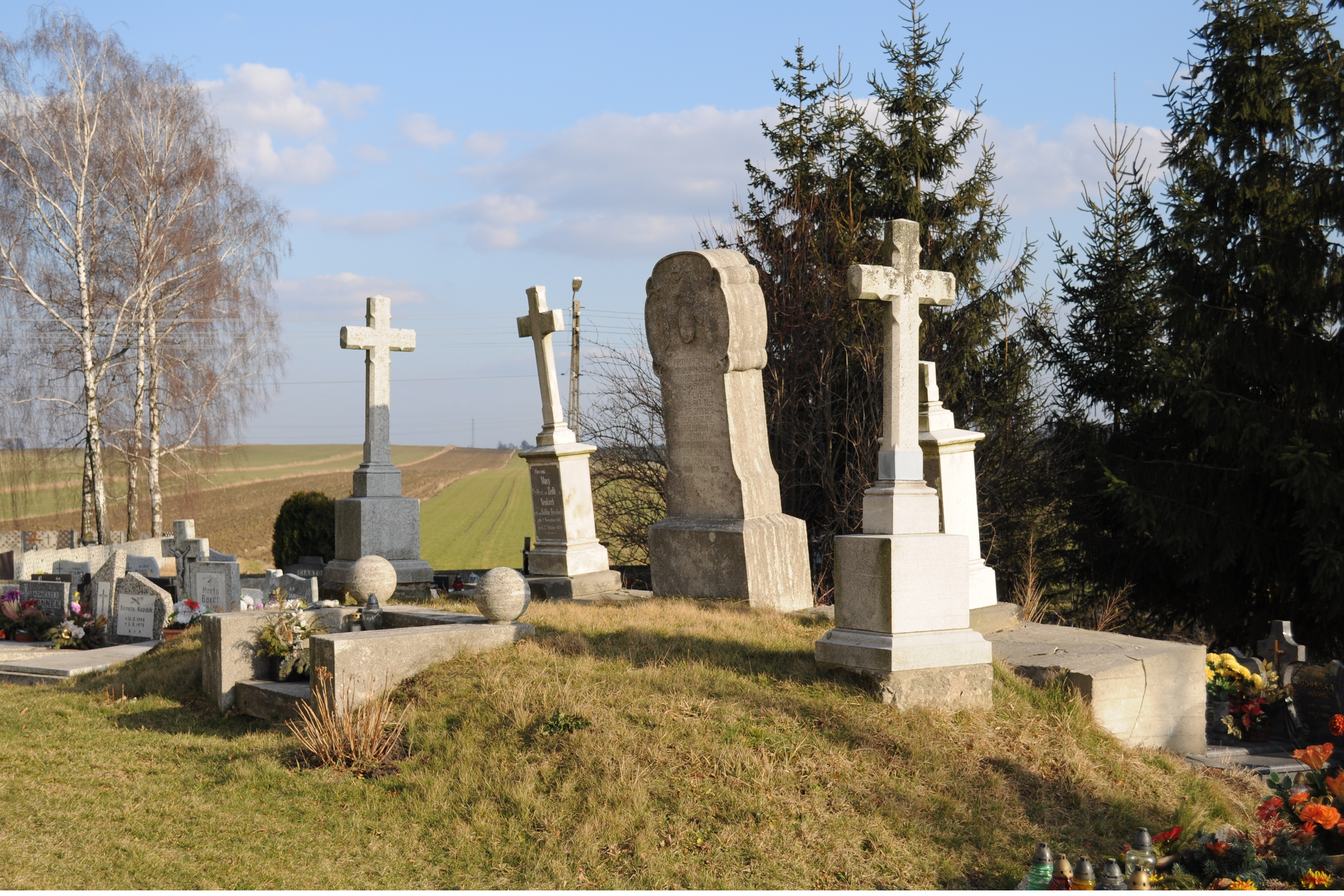 Łubie. Groby Baildonów